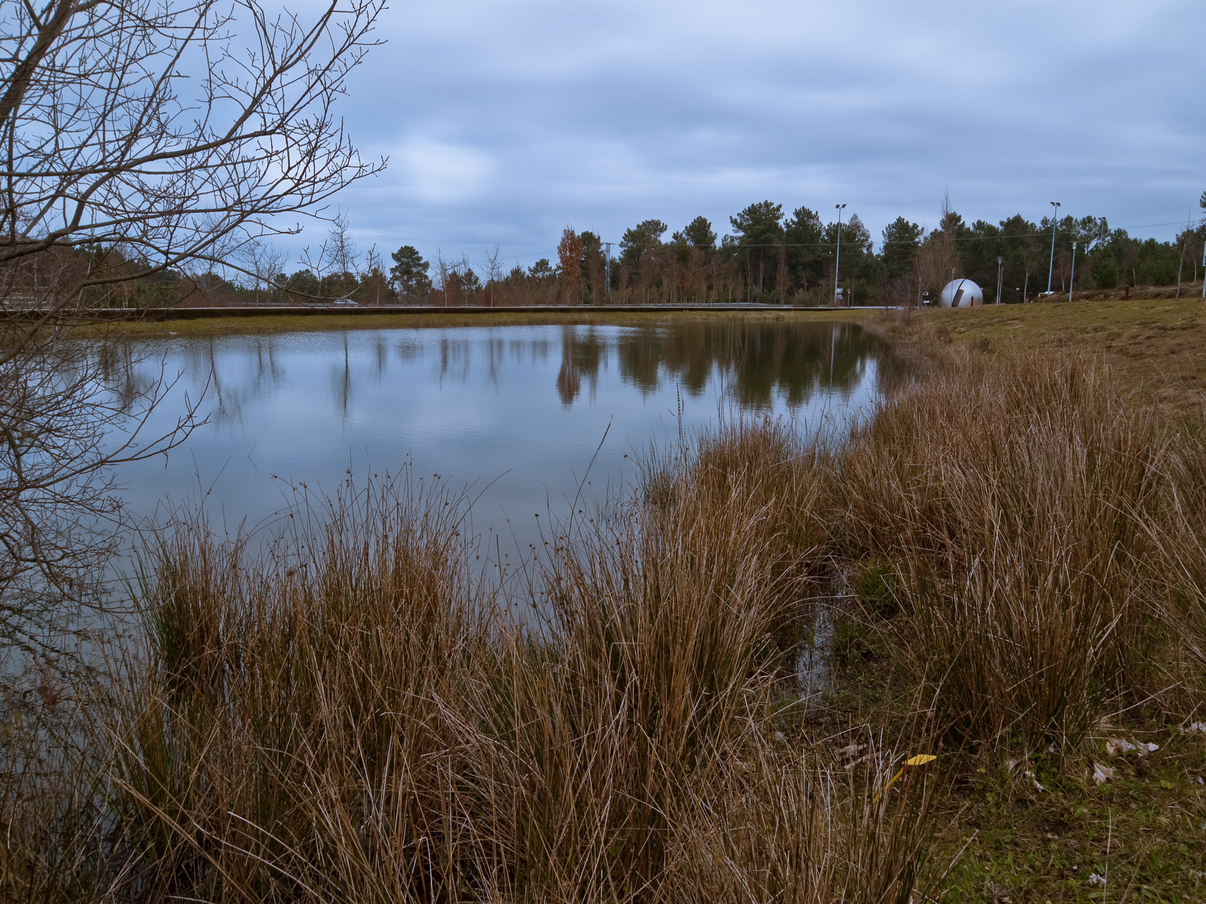 Lagoas Marcosende, Zamáns, Vigo